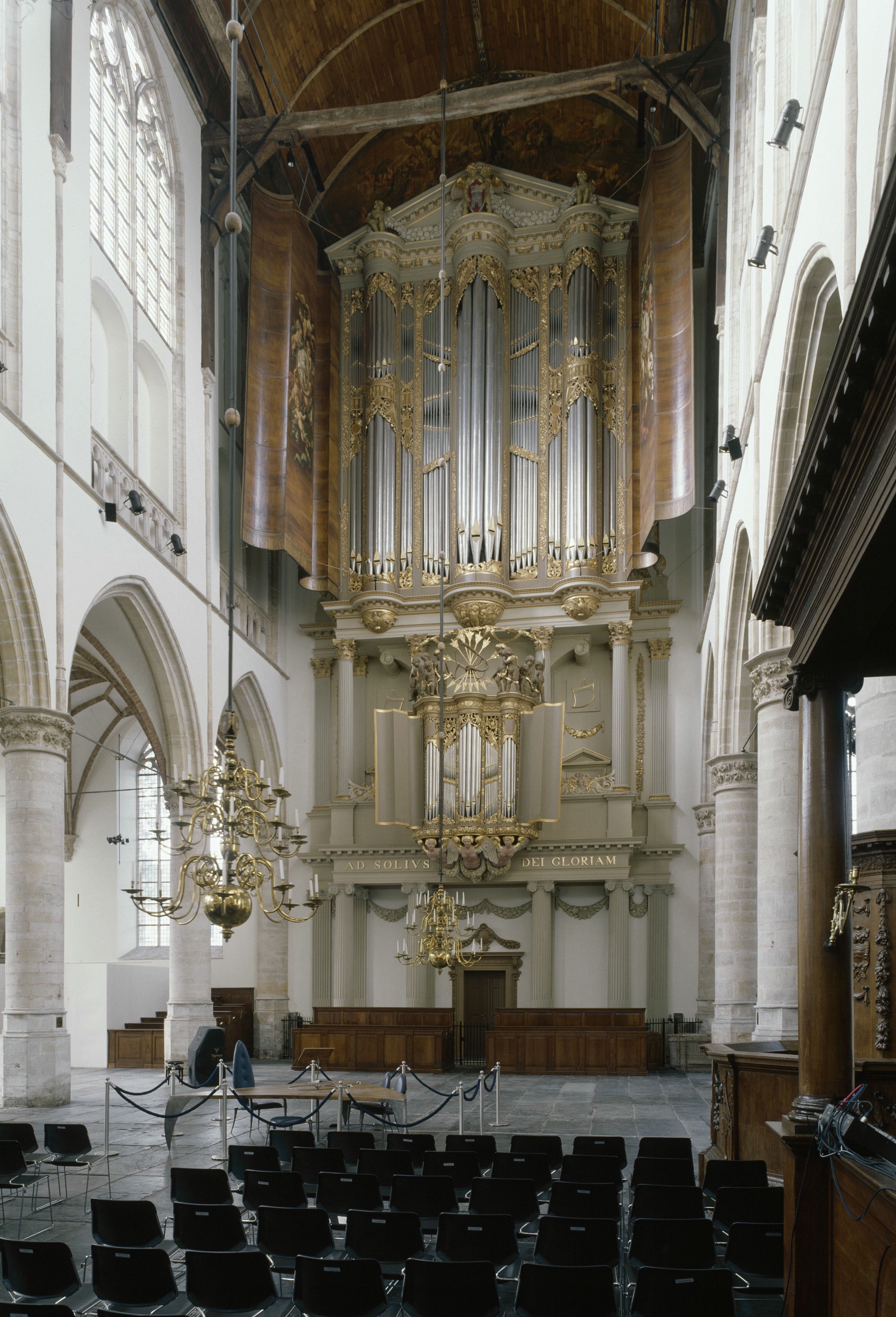 Grote Kerk: Interieur, aanzicht orgel, orgelnummer 30 (opmerking: Gefotografeerd voor Het Historische Orgel in Nederland 1479-1725, bladzijde 136)